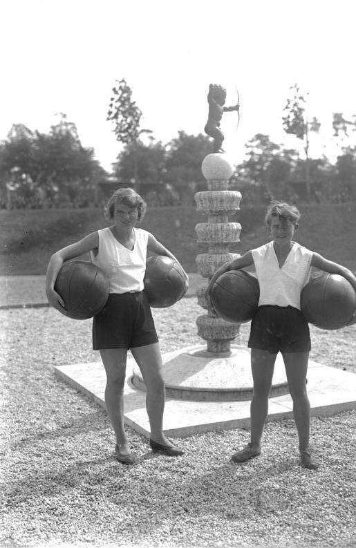 Die Sportstudentin! Zwei Sportstudentinnen des Annaheims in Berlin-Grunewald begeben sich mit den Medizinbällen zum ersten Spiel im Frühlings-Sonnenschein.